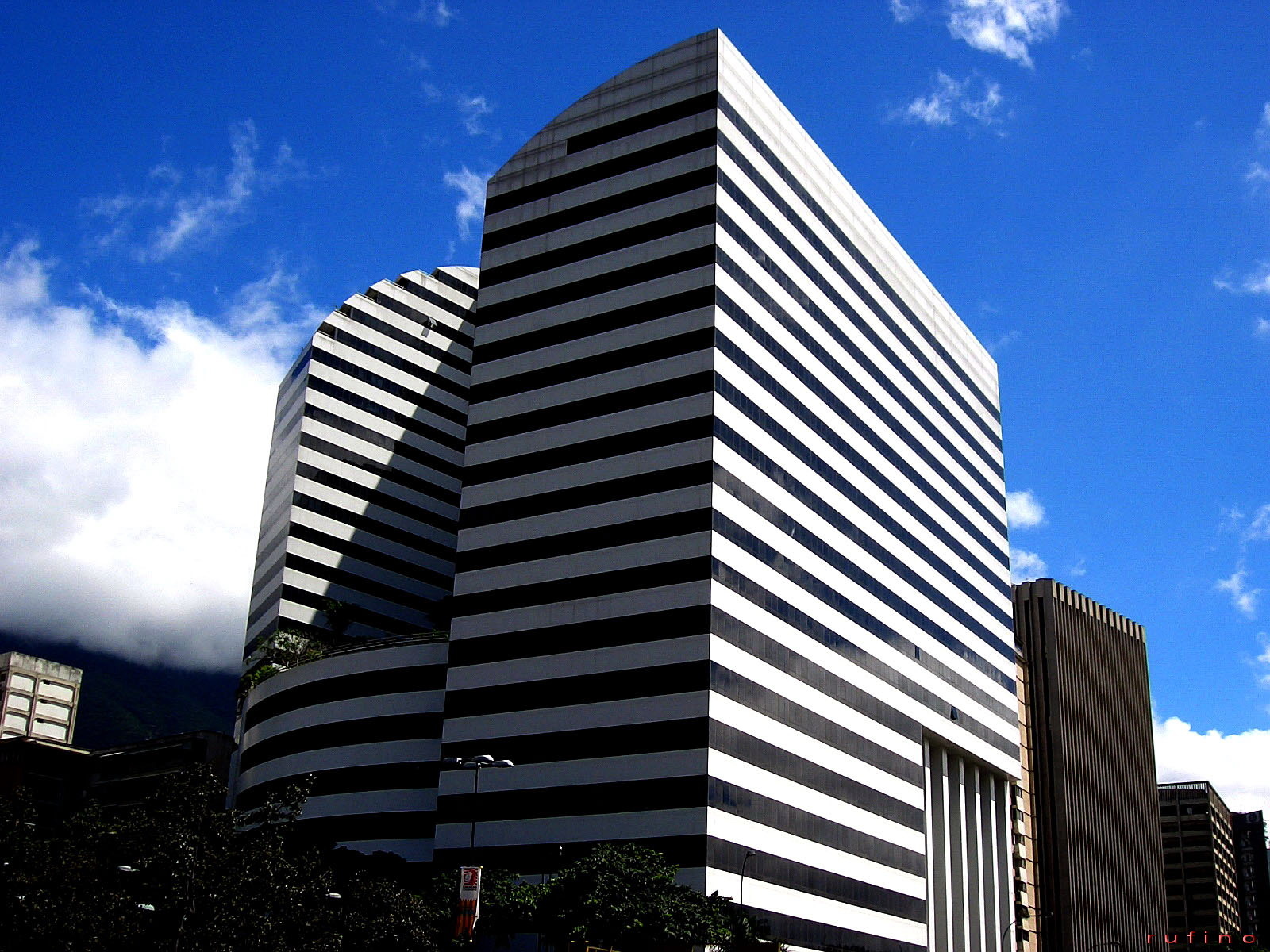 Edificio en Caracas